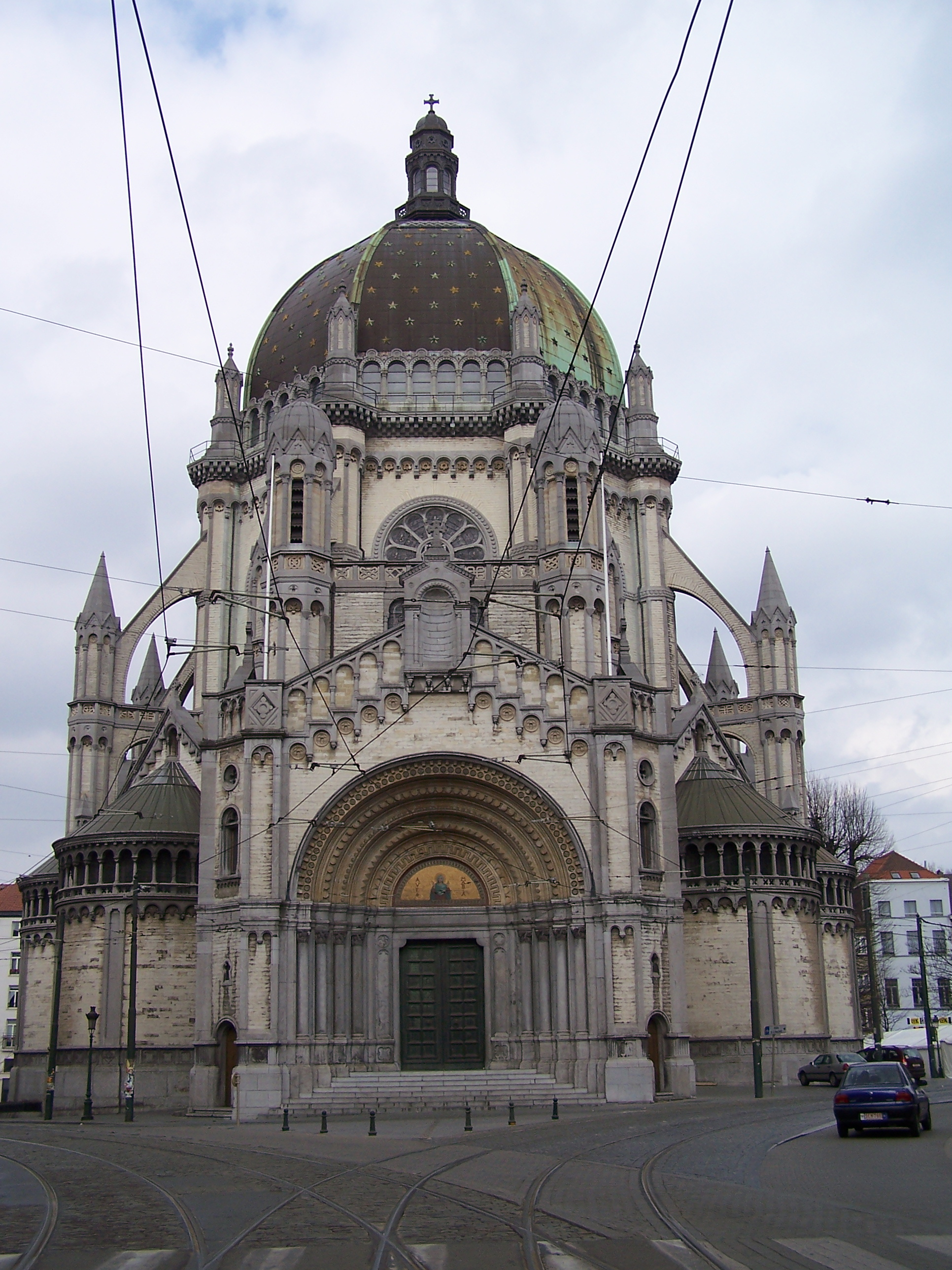 Sint Maria Church in Schaarbeek